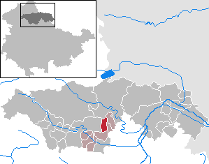 Trebra in Thuringia - Kyffhäuserkreis